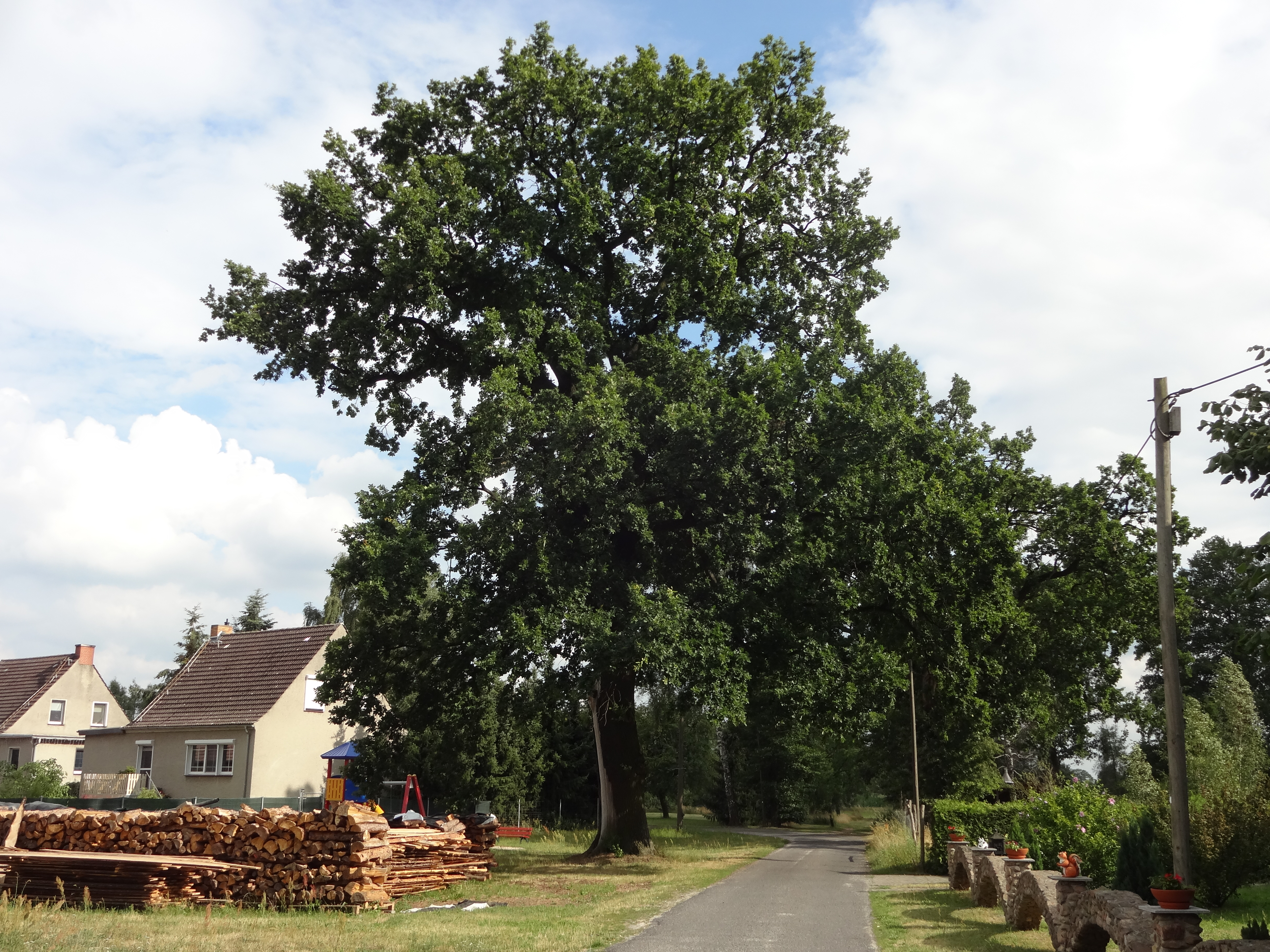 Naturdenkmal Stieleiche vor der Ortsstraße 8 in Saadow